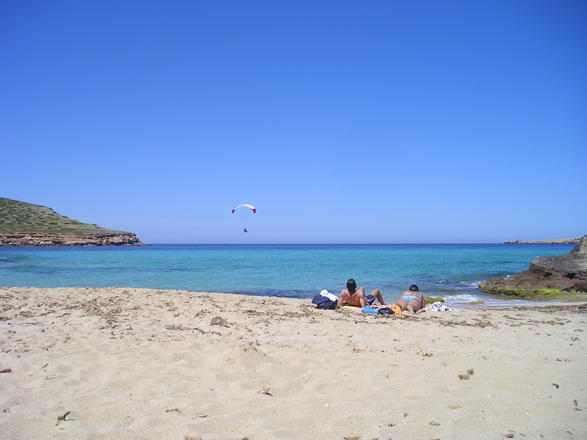 Motorschirmflieger über der Cala Conta, Ibiza, 04.2010